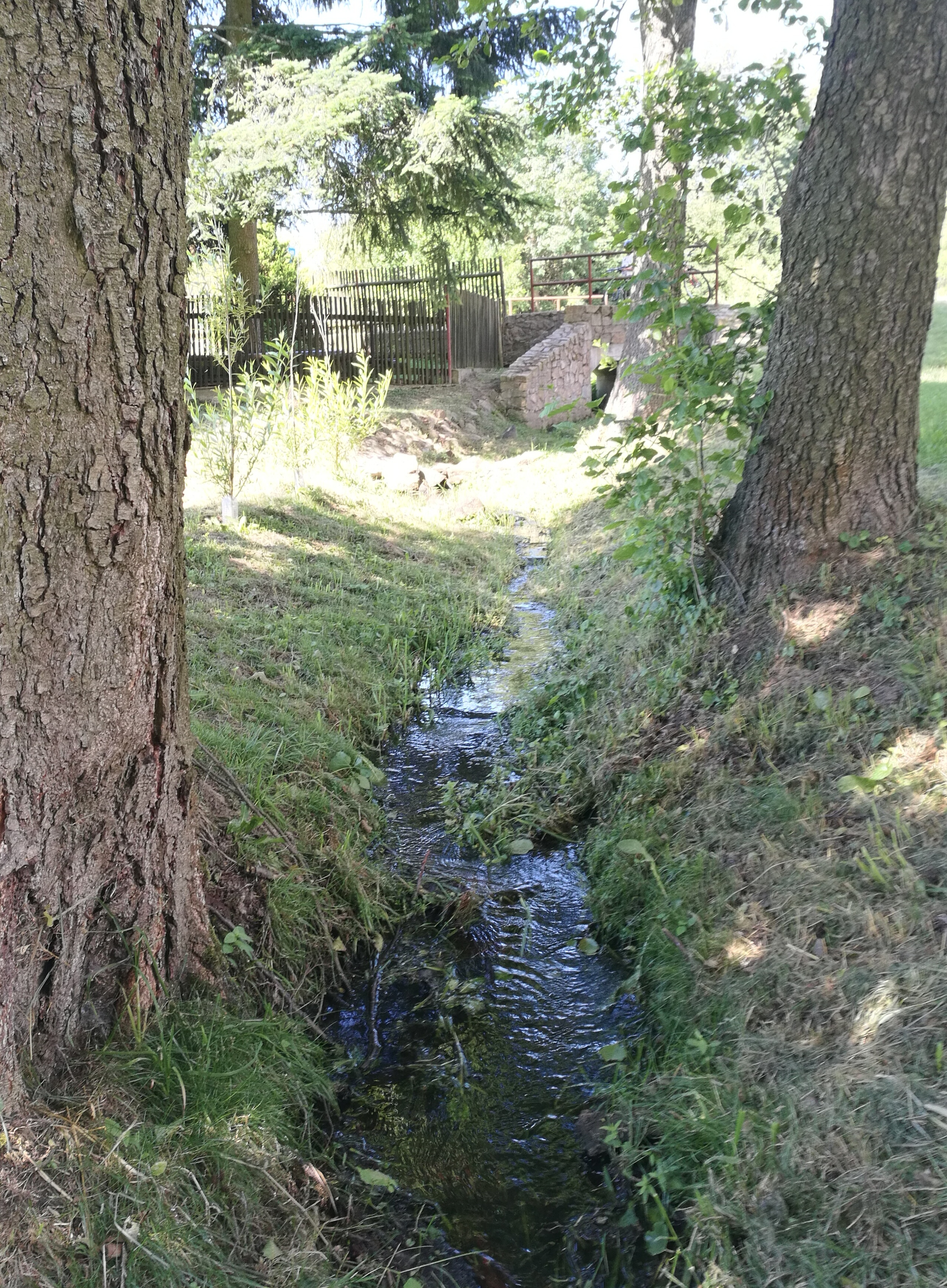 Řečický potok pod hrází Višťanského rybníka v Řečici.